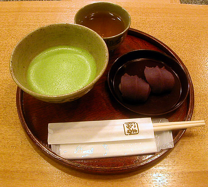 撮影者：小太刀 赤福餅「抹茶セット」。赤福餅（右）と抹茶（左）のセットです。奥にあるは、口直し用のほうじ茶です。